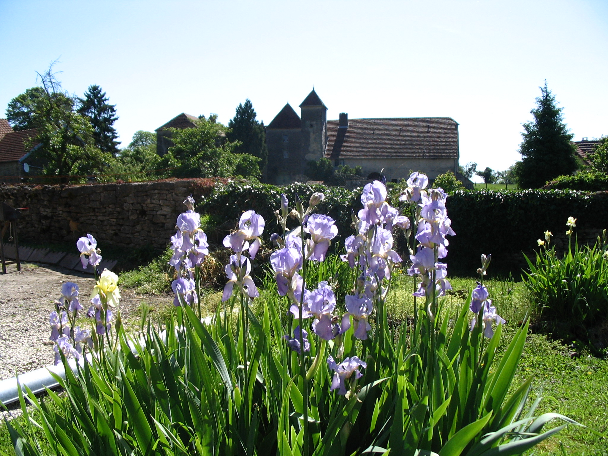 Château de Ferrières les Scey